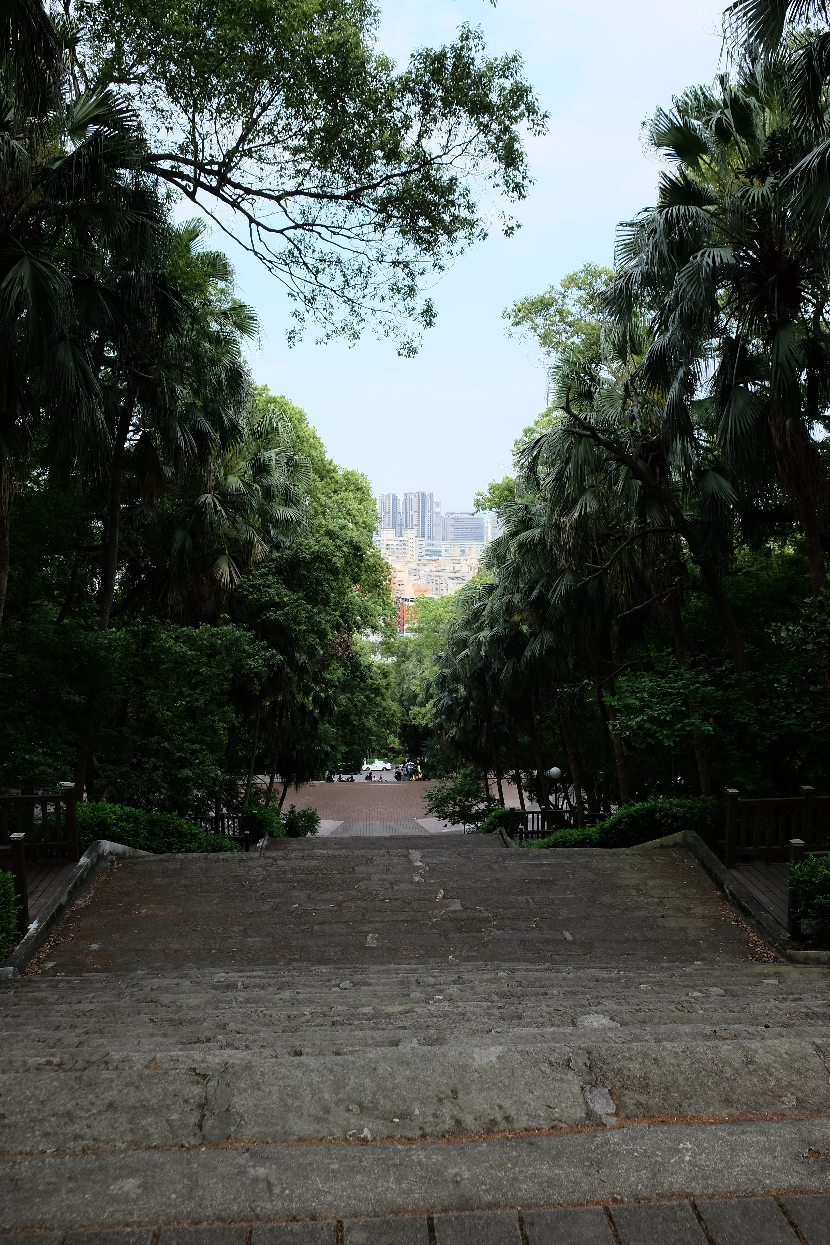 CiXiu park, Taishan District 2018 辭修公園